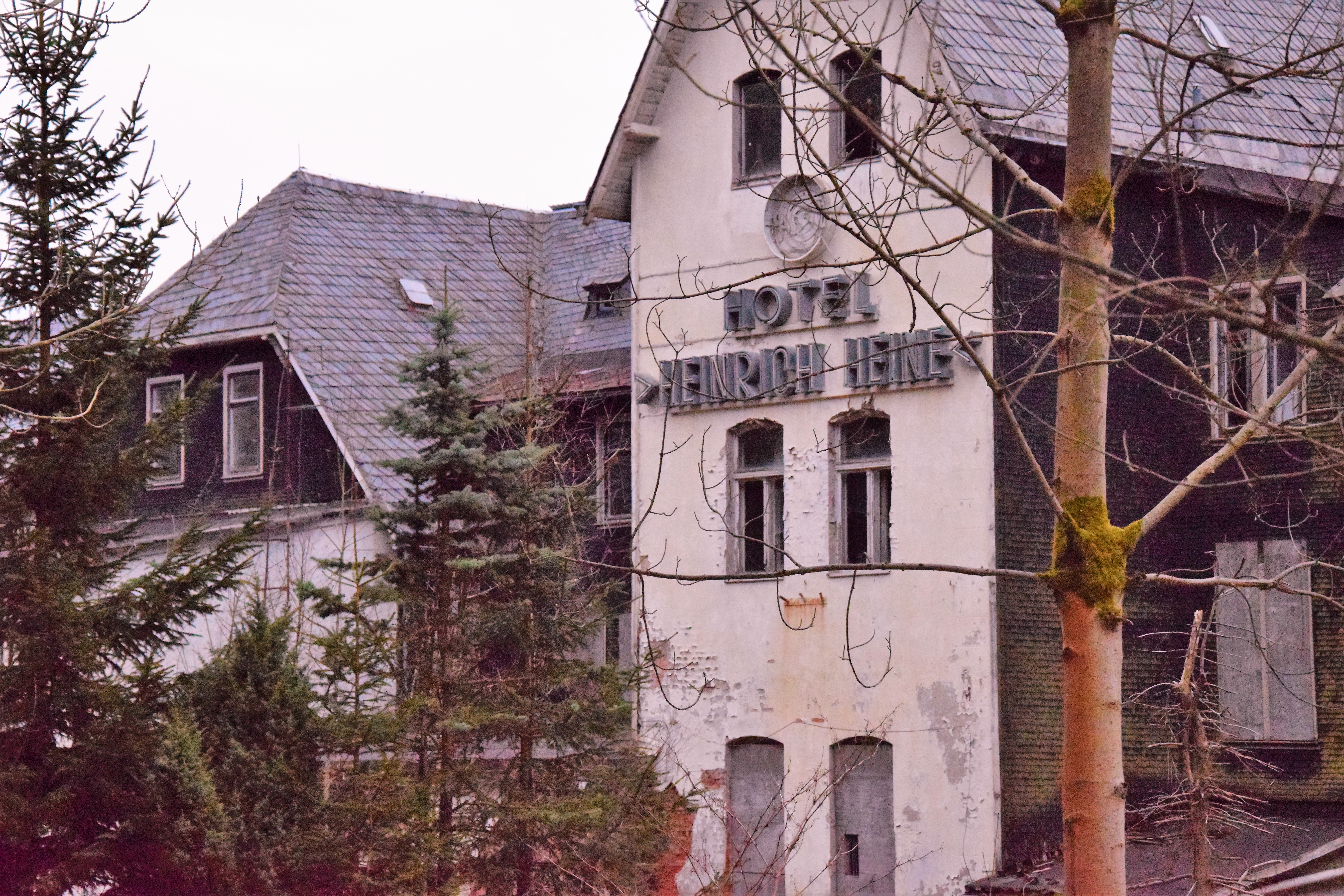 Blick auf das ehemalige Hotel Heinrich Heine in Schierke